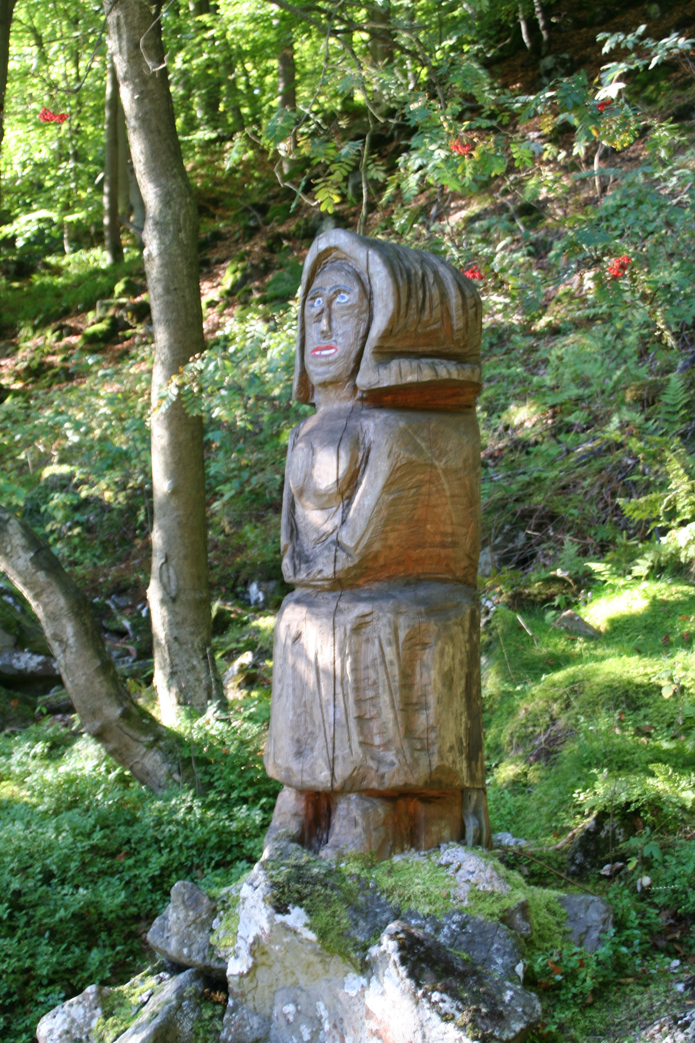 Eine weitere hölzerne Statue Frau-Holle-Teich auf dem Hohen Meißner. Nach einer unbestätigten Aussage wurde diese Statue von einem Waldarbeiter mit der Motorsäge erstellt.